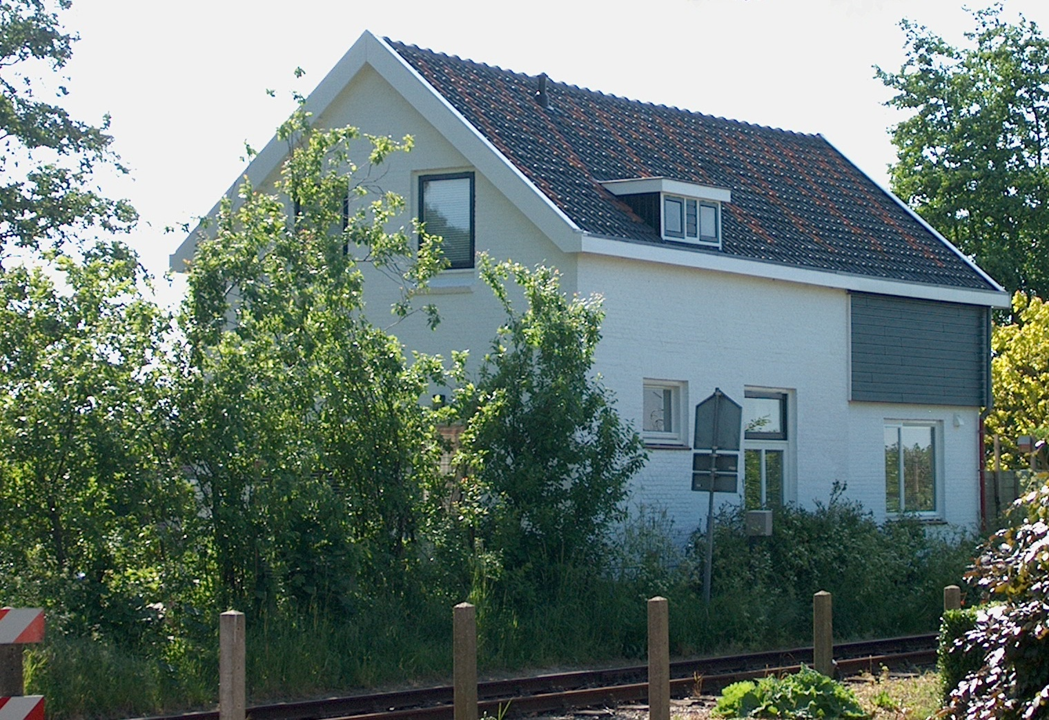 Voormalig haltegebouw Zwaagdijk, aan de spoorlijn Hoorn-Medemblik.